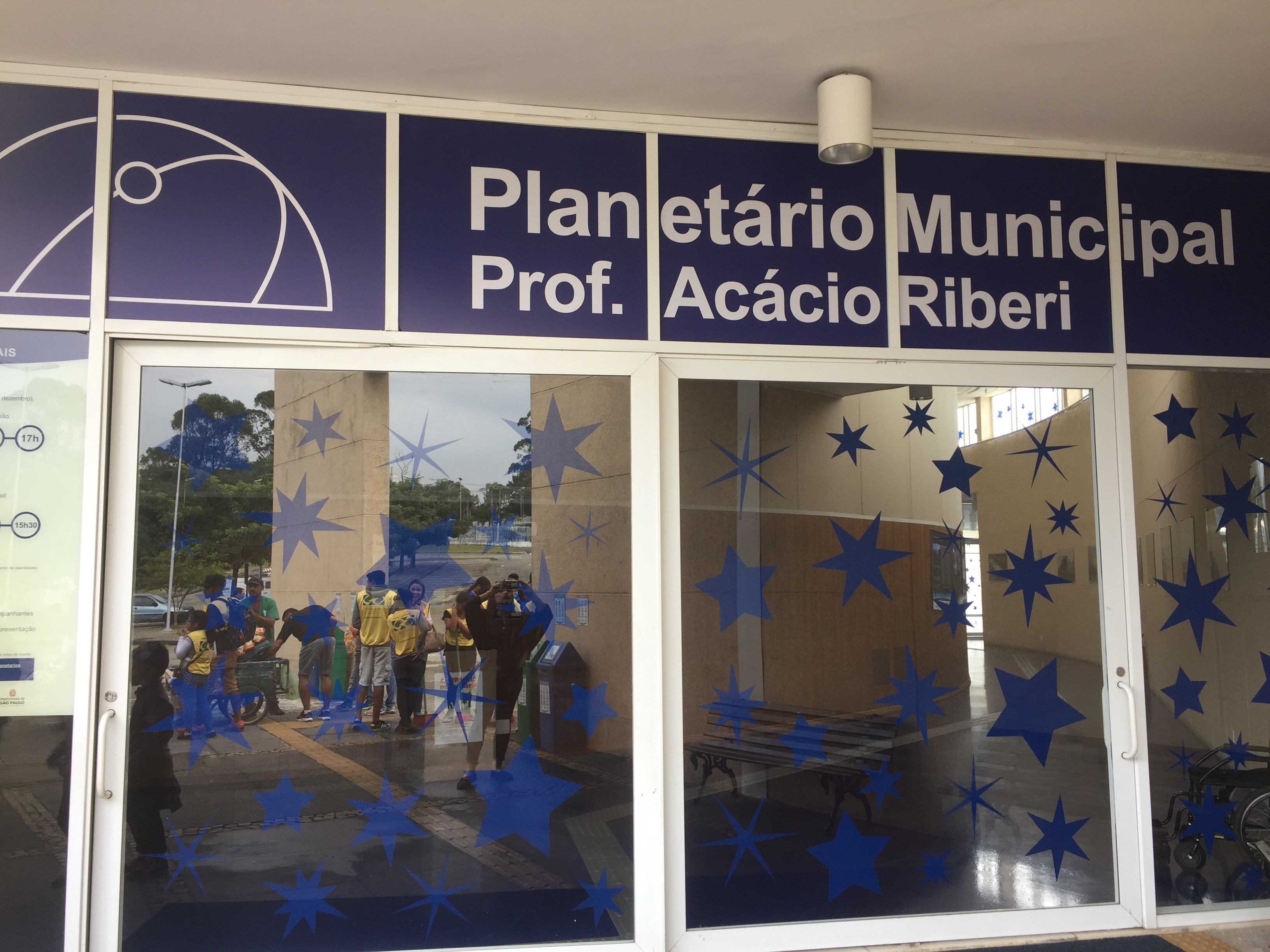 Fachada do Planetário do Carmo com seu nome completo (Planetário Municipal do Carmo Prof. Acácio Riberi)